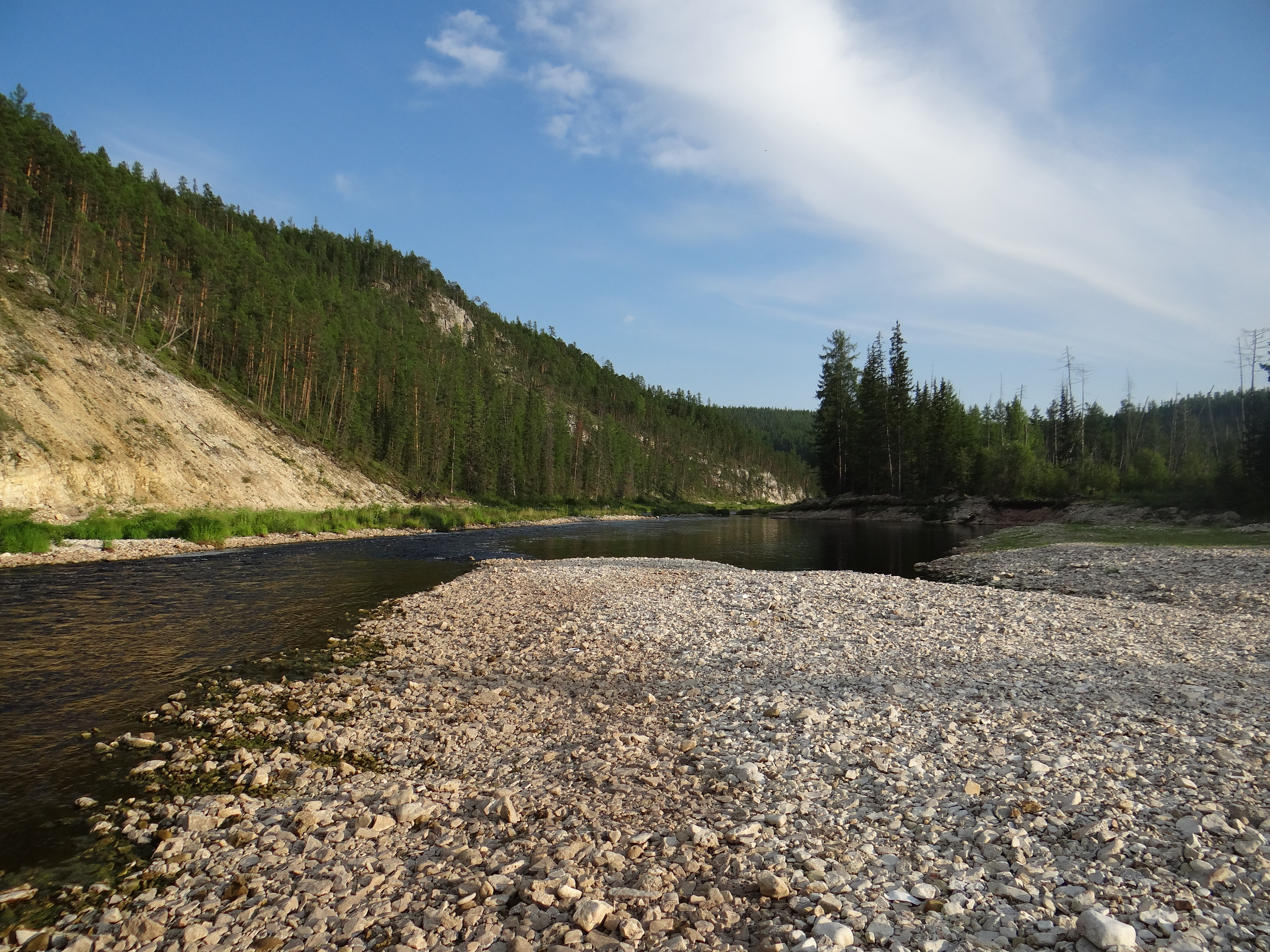 река Пеледуй в среднем течении